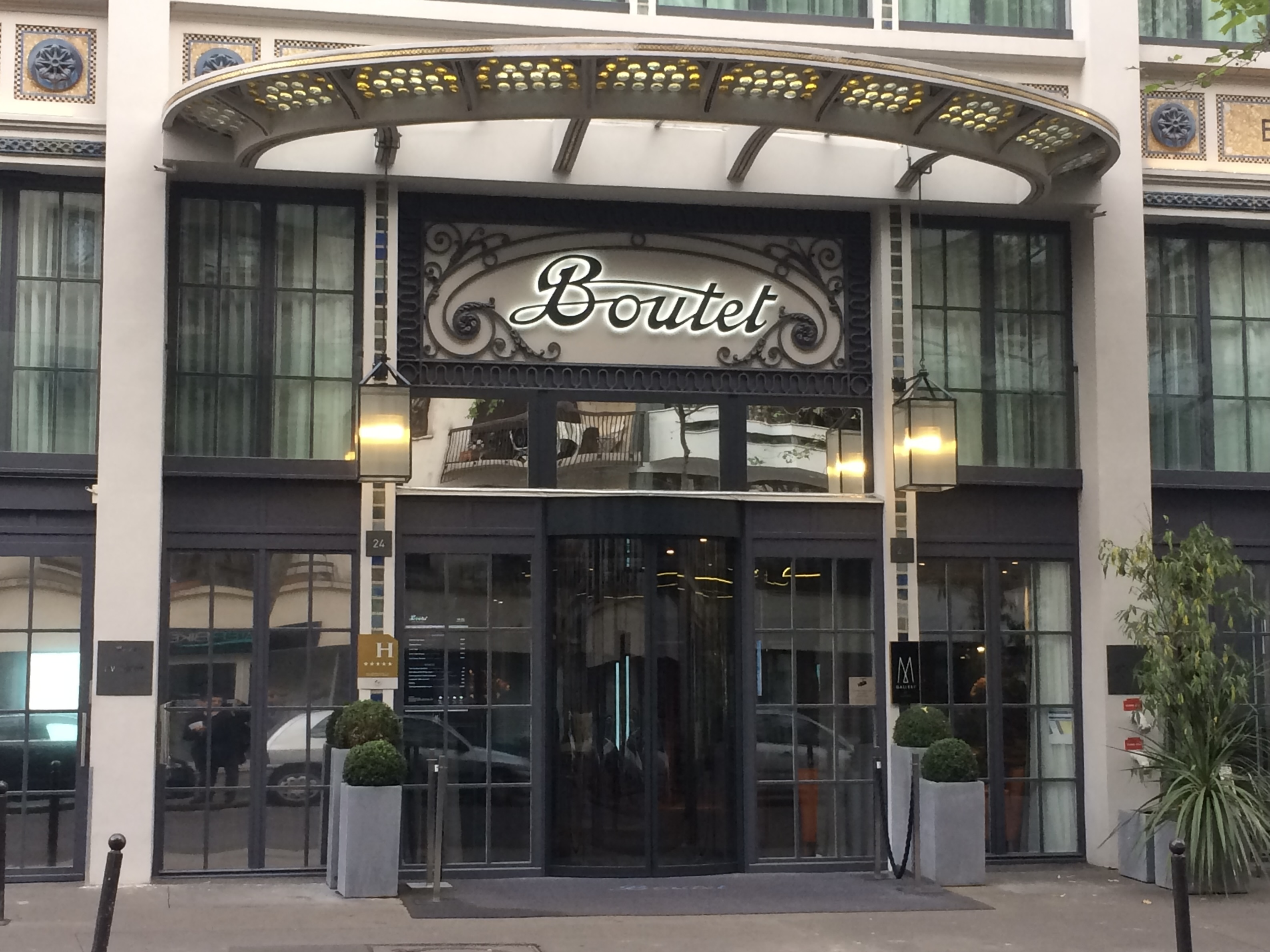 Entrée de l'Hôtel Boutet, 24 rue Faidherbe à Paris, en novembre 2016